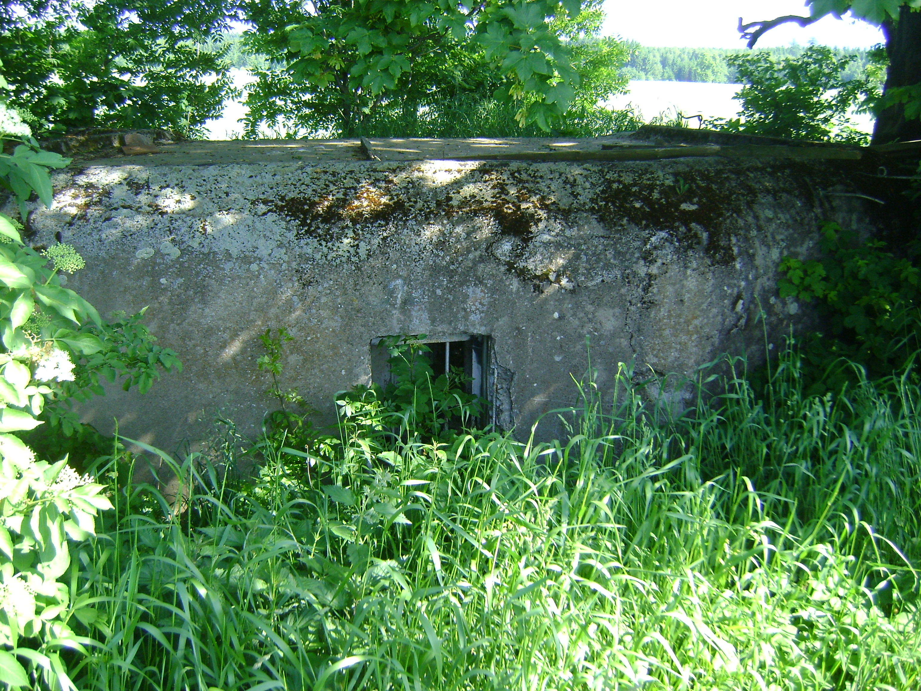 Ropik bunkier przeciwpiechotny na północnym zboczu wzniesienia Hůrka z lat 1936-1938 wchodzące w system tzw. Betonowej granicy zbudowanej w celu obrony ówczesnej rubieży przed Niemcami.